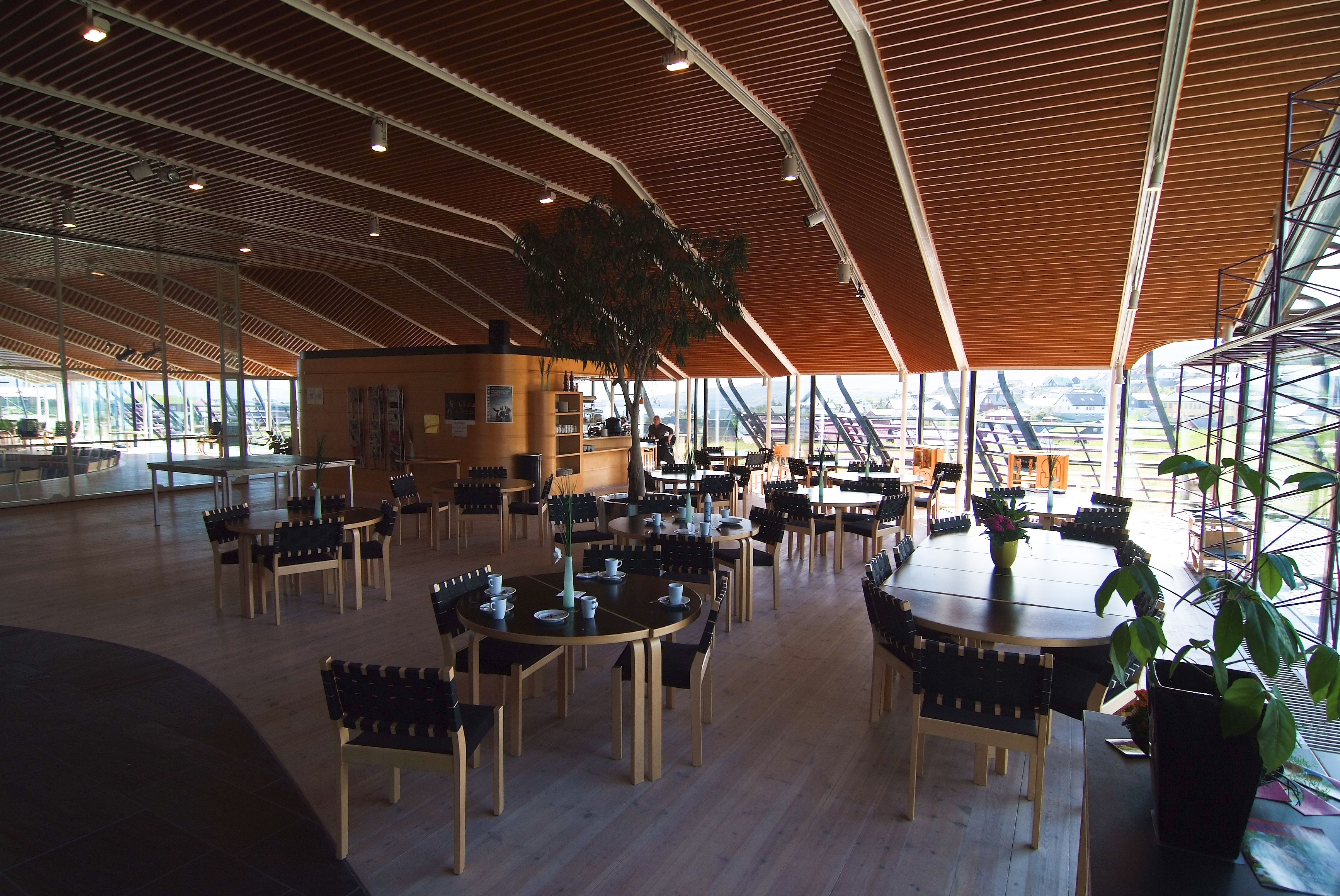 Norðurlandahúsið